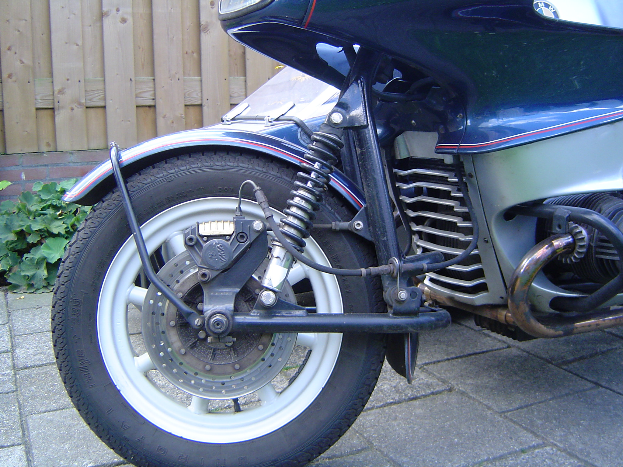 Schommelvoorvork